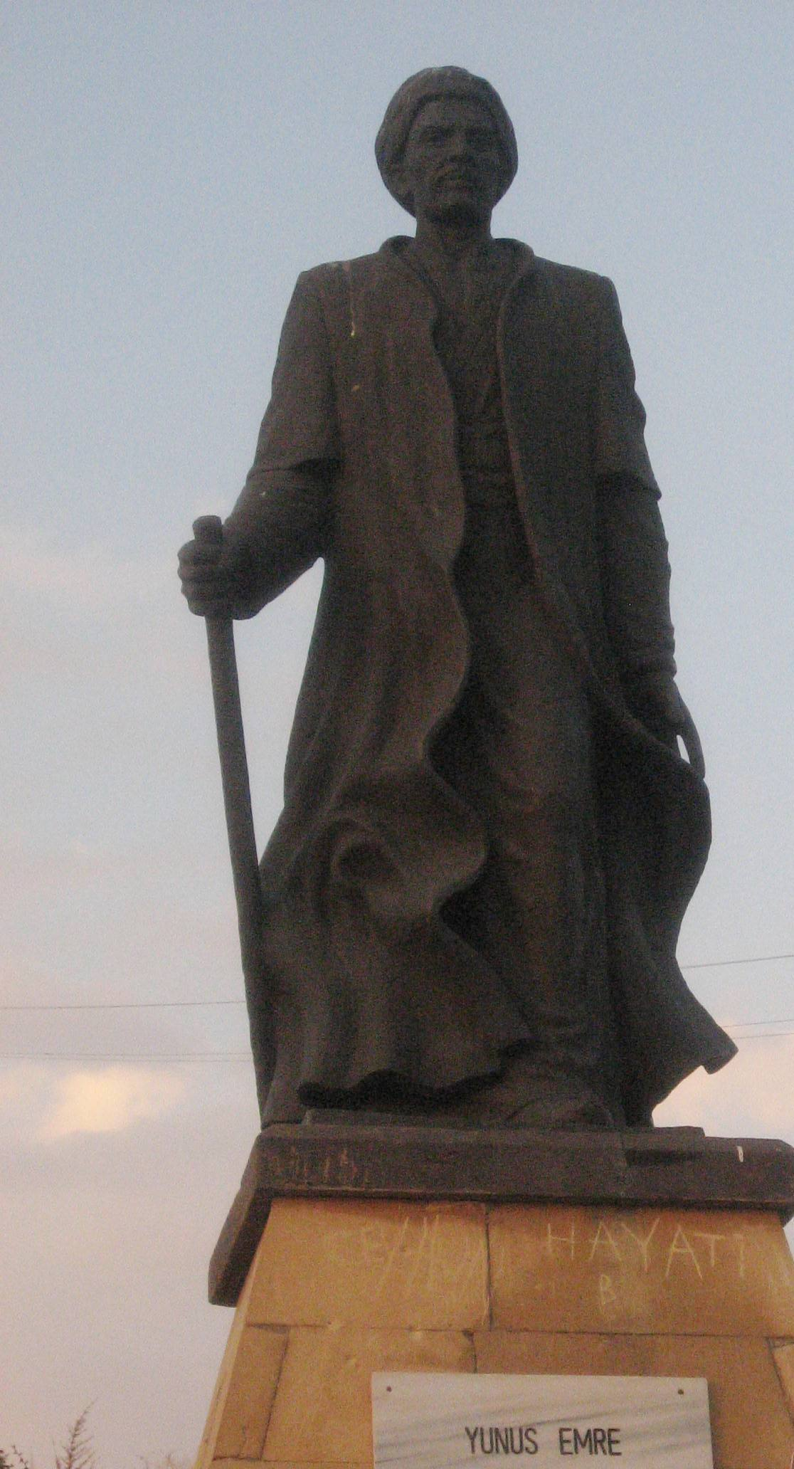 Darstellung von Yunus Emre bei der Gedenkstätte Nevsehir/ TR in der Ortschaft Haci Bektas.